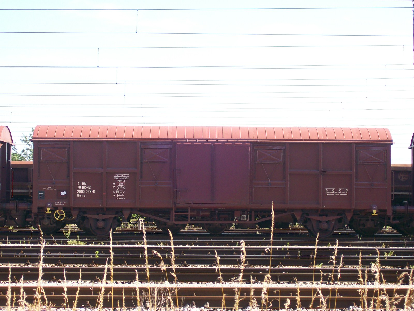 Teretni vagon Hrrs-z